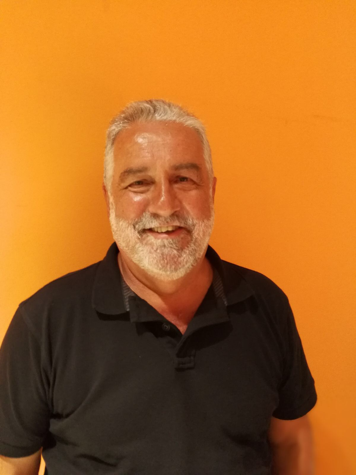 Rafael Nadal i Farreras